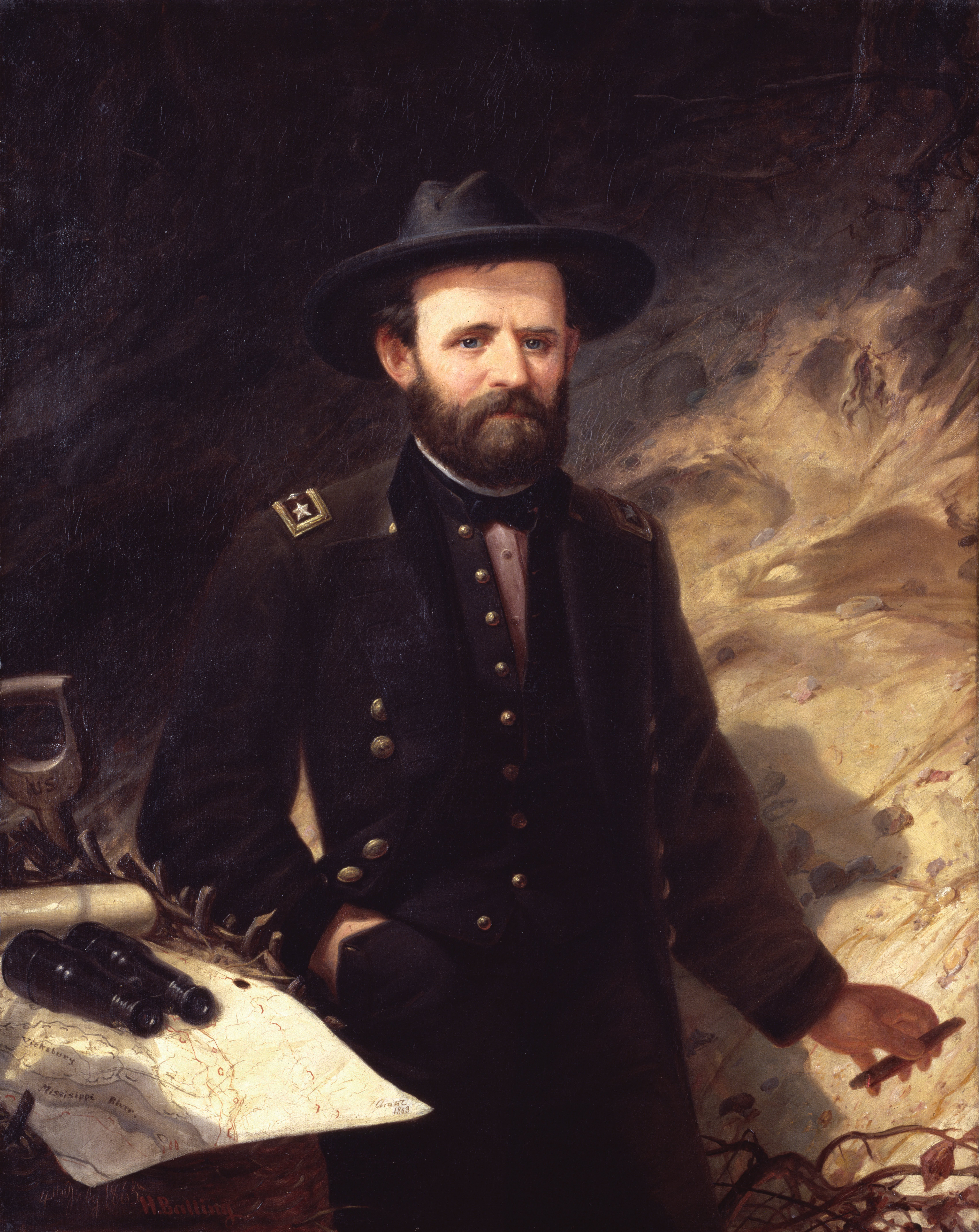 Ulysses S. Grant label QS:Len,"Portrait of Ulysses S. Grant (1822-1885)" label QS:Lru,"Портрет Улисса Гранта (1822-1885)"